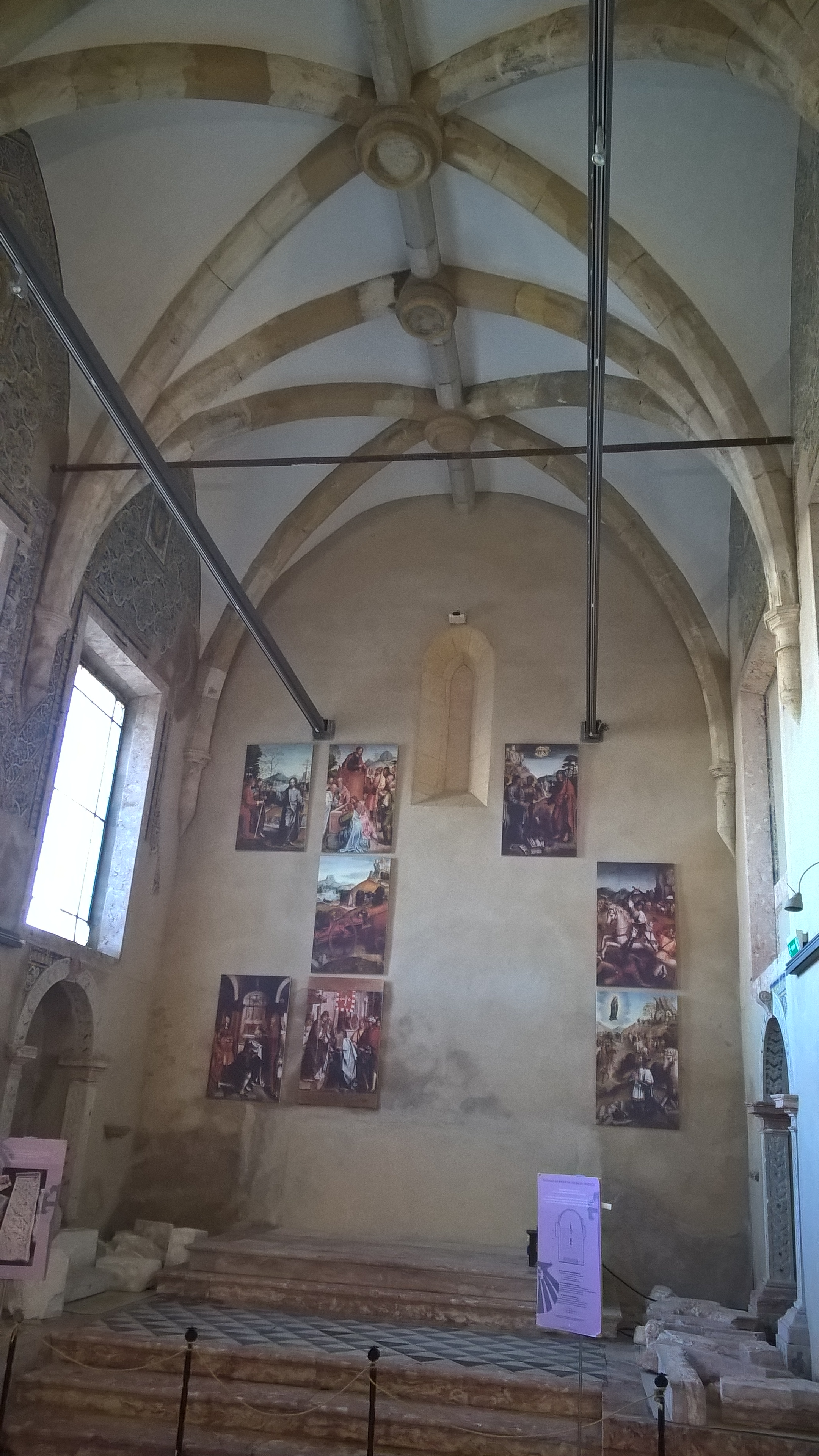 Capela Mor da Igreja de Santiago (Palmela) estando colocadas na parede do topo leste, sobre o altar, cópias das pinturas do Políptico da Vida e Obra de Santiago, que teria feito parte do Retábulo desta Igreja, estando as pinturas colocadas segundo a disposição conjectural no Retábulo.